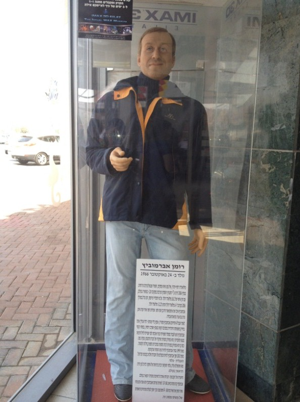 פסל שעווה של רומן אברמוביץ' בכניסה לקניון מול הים.